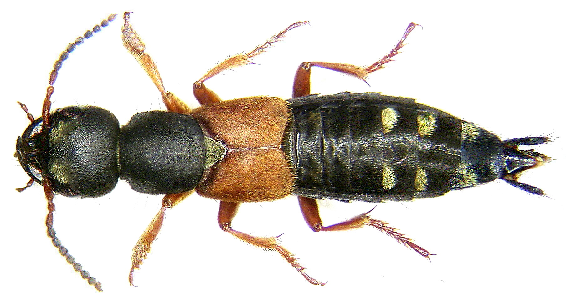 Familie: Staphylinidae Grösse: 14-18 mm Verbreitung: Europa Fundort: Germania, Oberfranken, Bad Steben leg. det. U.Schmidt, 2005 Foto: U.Schmidt, 2006